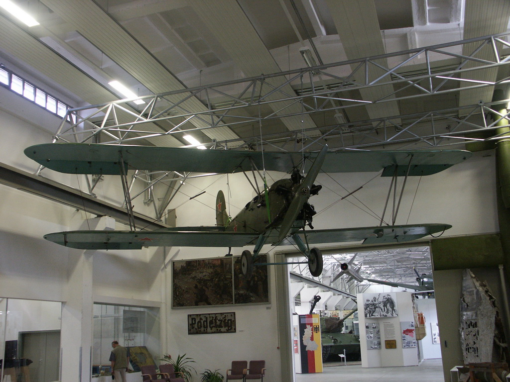 Bundeswehrmuseum Dresden mit Teilen von der NVA Remark: Polikarpov Po-2.